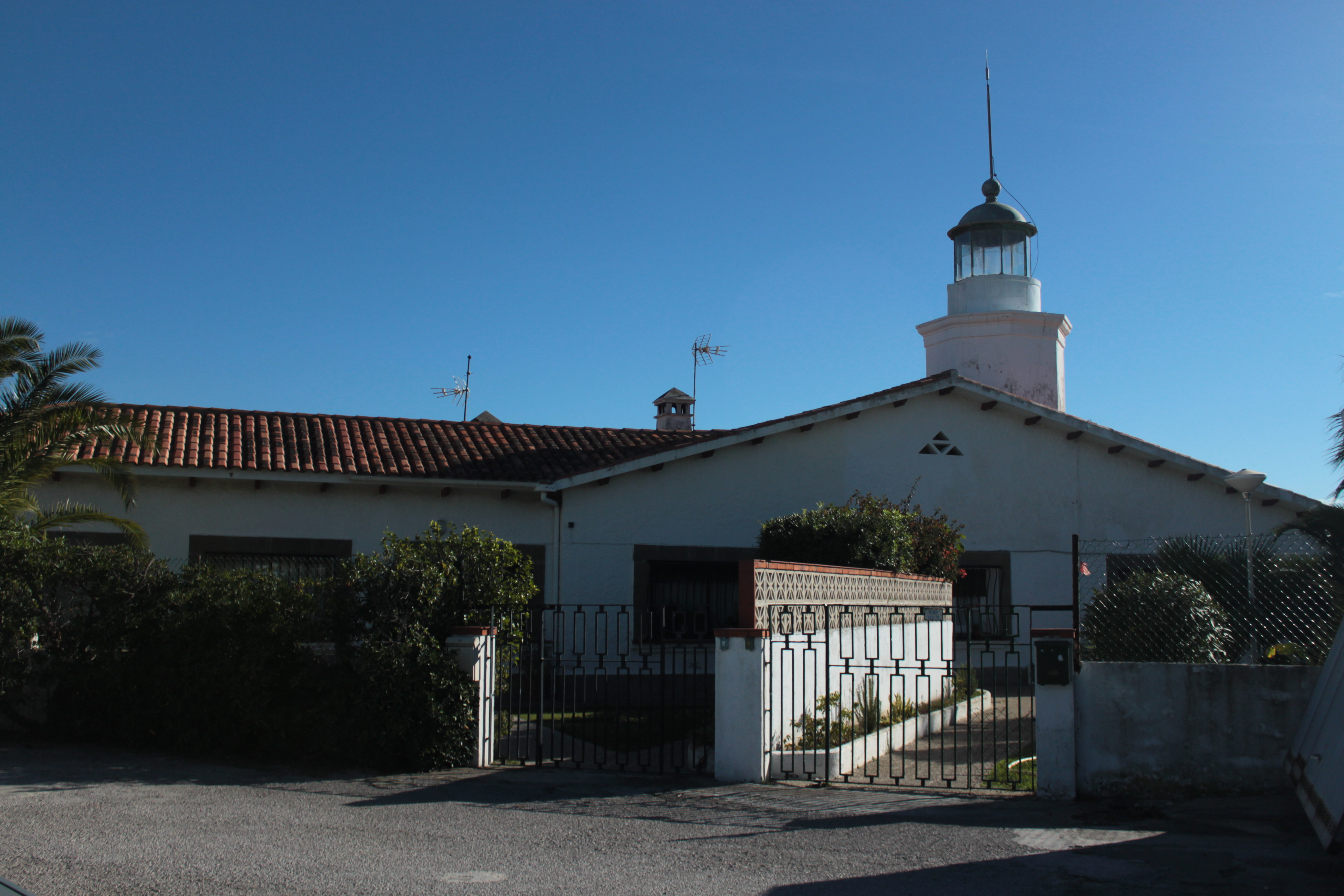 Restos del Fuerte de Isla Verde, en el interior de las instalaciones del Puerto de Algeciras. Algeciras, Andalucía, España.